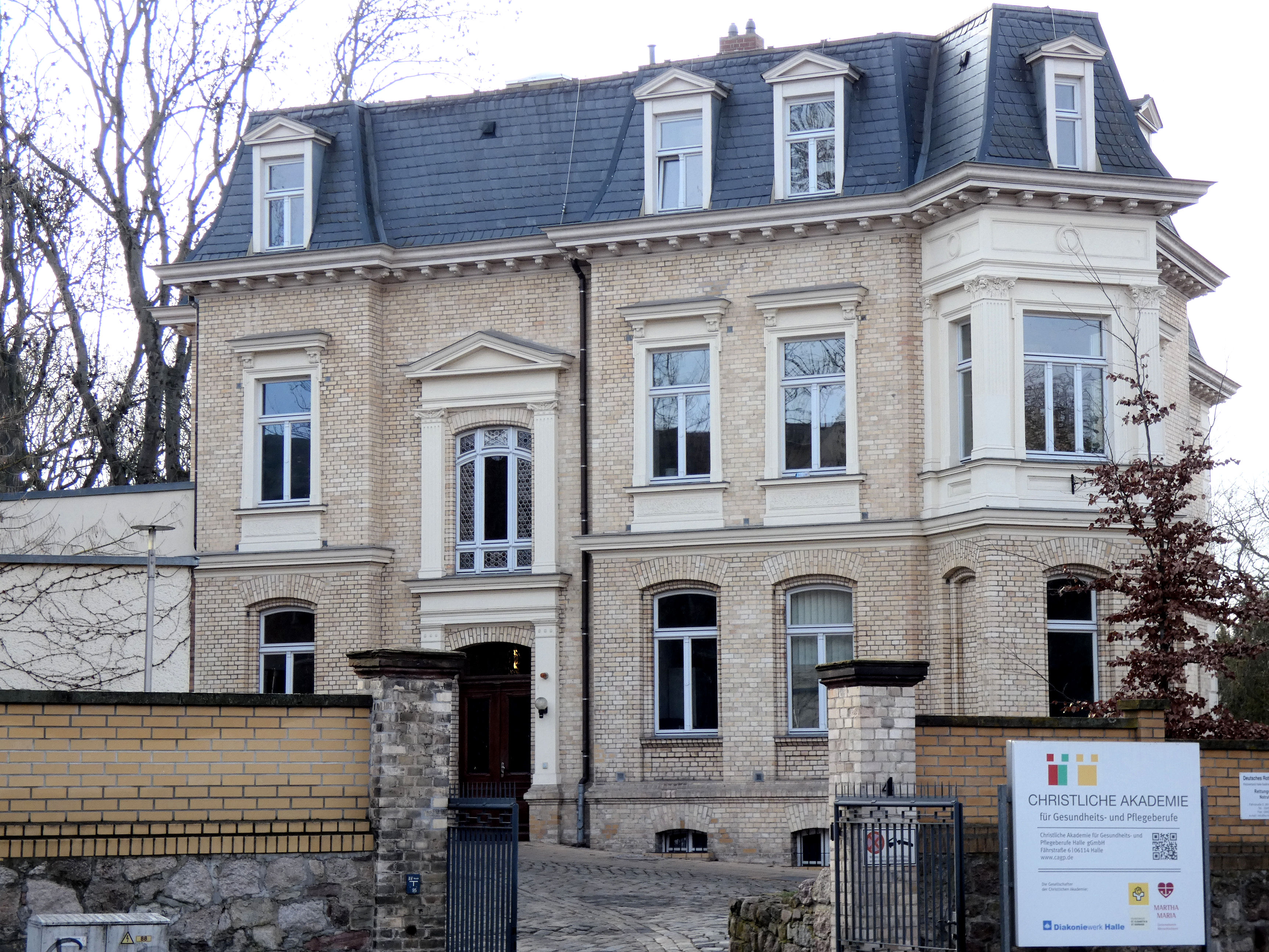 Fährstraße 4, Halle (Saale), ehemaliges Verwaltungsgebäude der Baumwollspinnerei Rabe, heute Christliche Akademie für Gesundheits- und Pflegebrufe